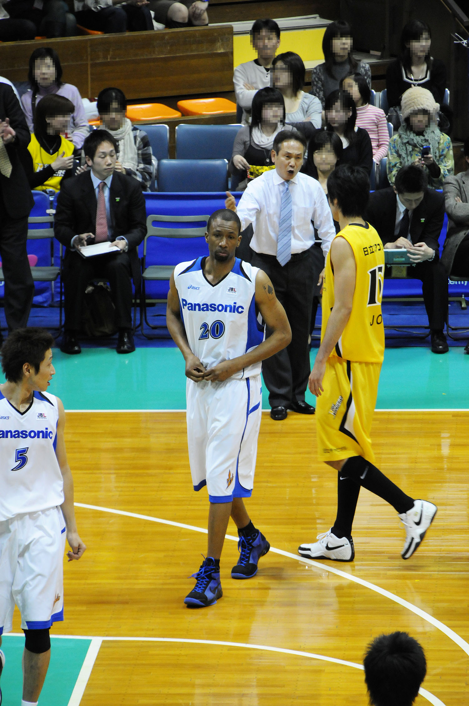 パナソニックトライアンズ、エイドリアン・カスタス選手。代々木第二体育館で。